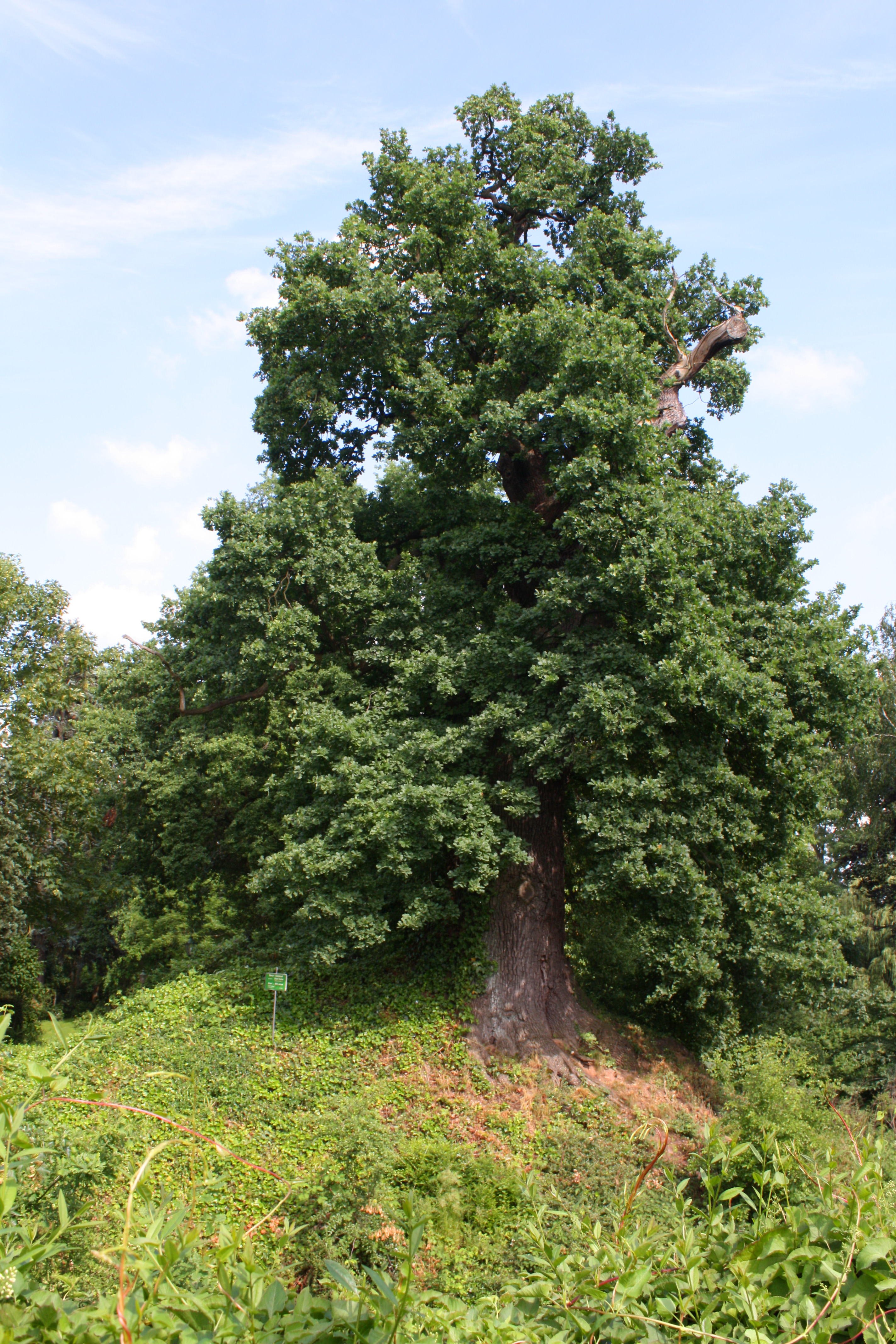 Erftstadt Konradsheim, Naturdenkmal 650jährige Eiche